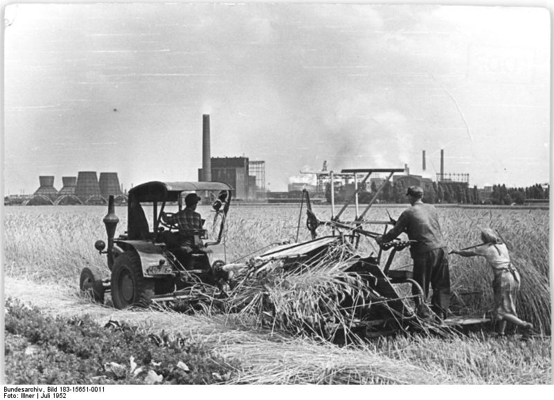 Zentralbild-Illner , 29.7.52 Die Kollegen der MAS Nöthnitz helfen den Bauern bei der Einbringung der Roggenernte. Im Hintergrund das Benzinwerk Böhlen.